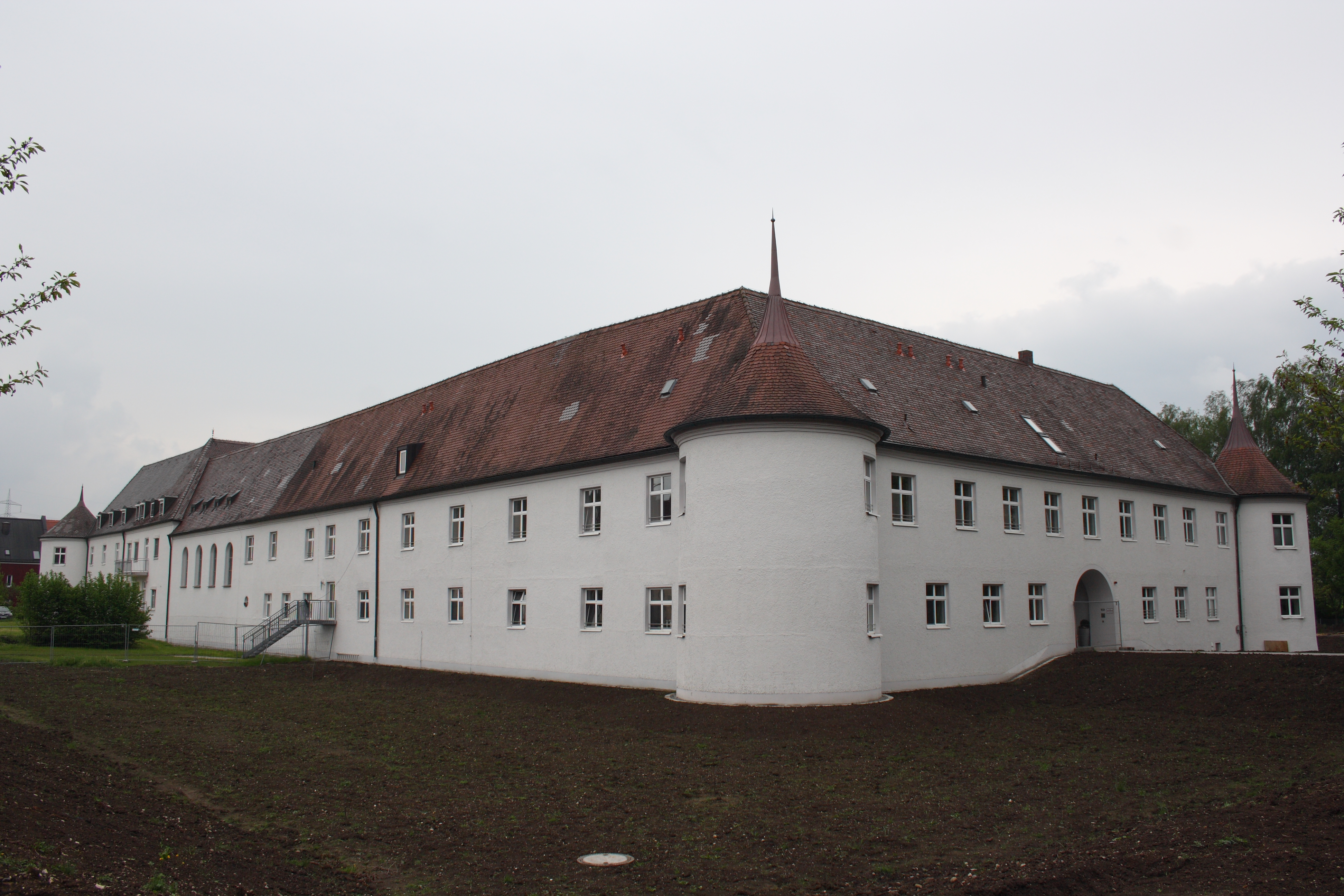 ehemaliges Schloss der Familie Fugger-Glött in Glött im Landkreis Dillingen an der Donau (Bayern)